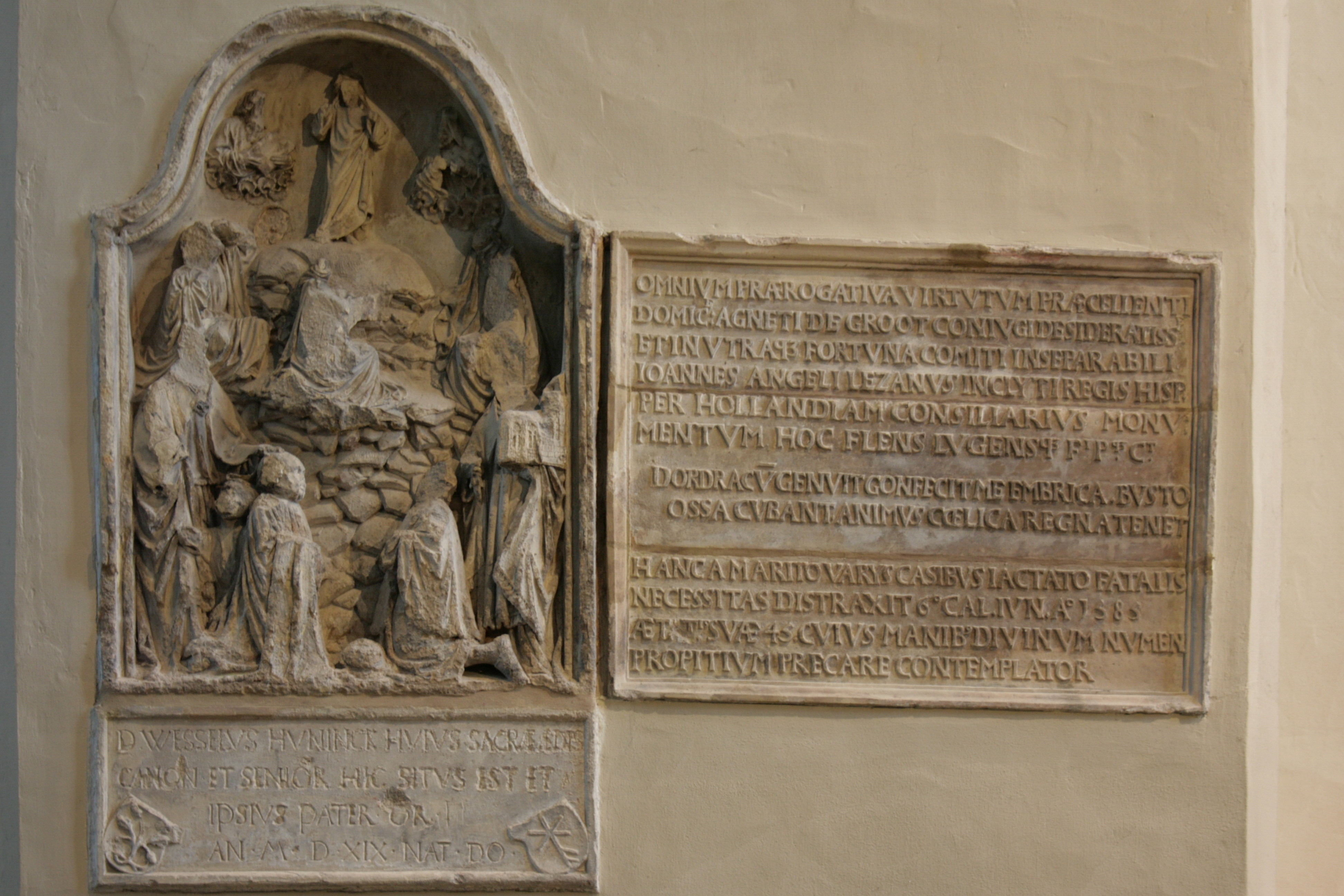 Sankt Martini in Emmerich am Rhein